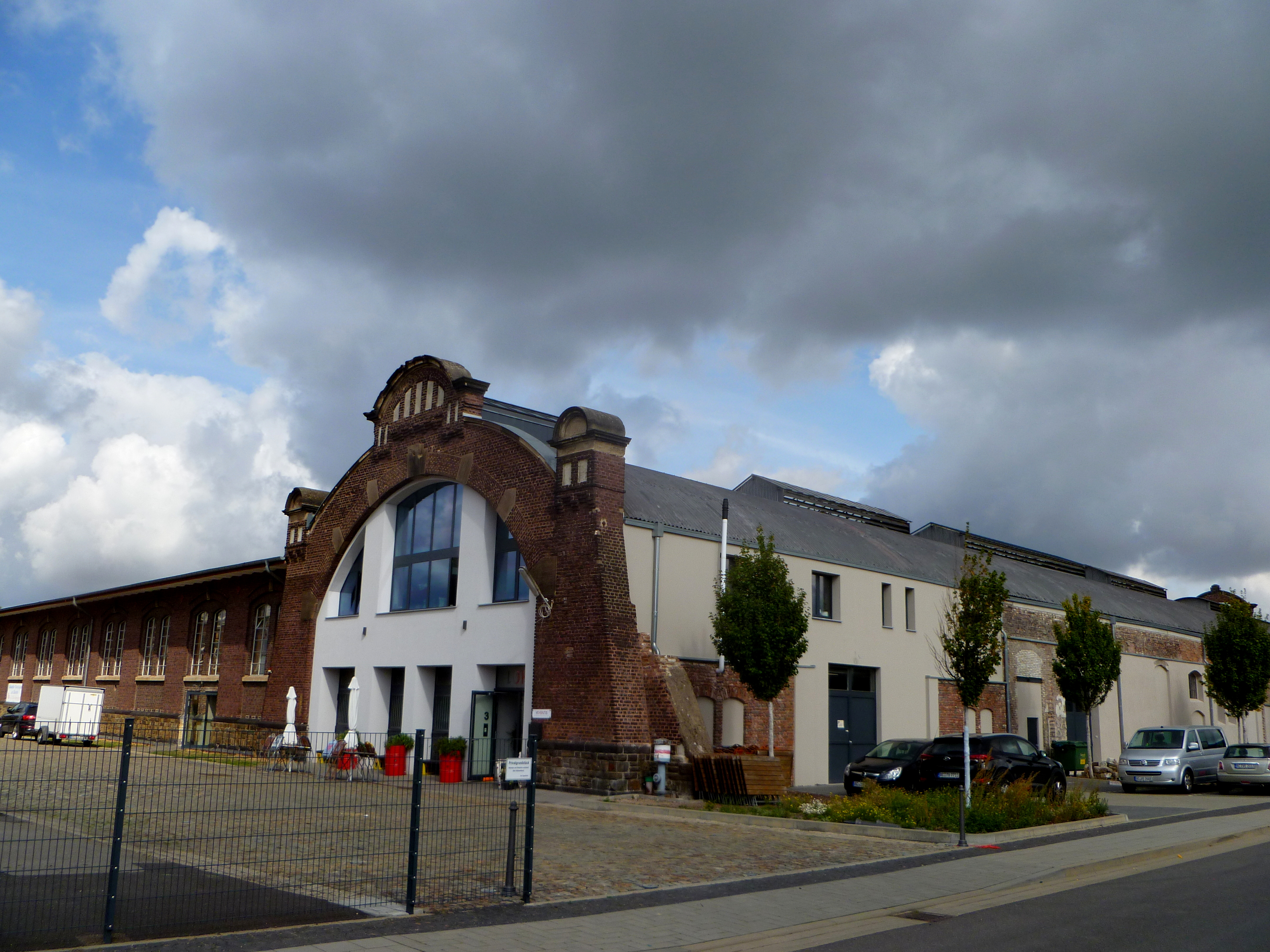 Alter Schlachthof Aachen; Rinderschlachthalle angebaut an der Verbindungshalle/Verkehrshalle (Südansicht); Baudenkmal